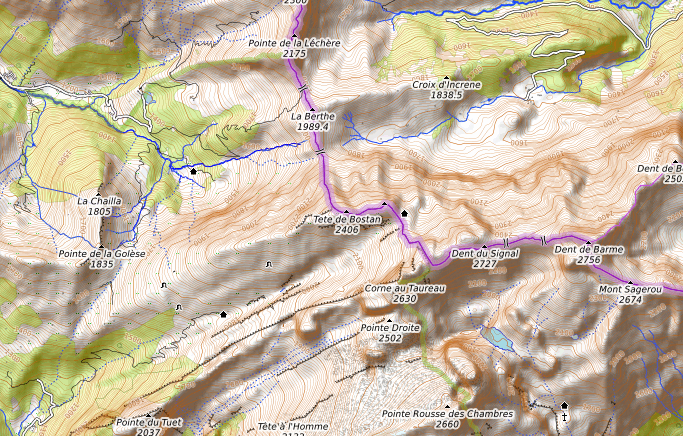 carte réalisée sur umap This map may be incomplete, and may contain errors. Don't rely solely on it for navigation.